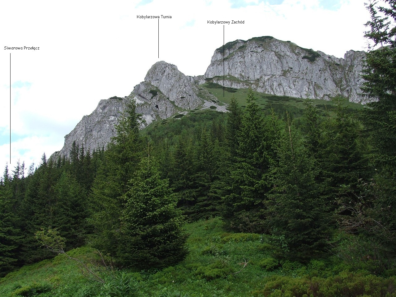 Widok z grzbietu Ciemniaka